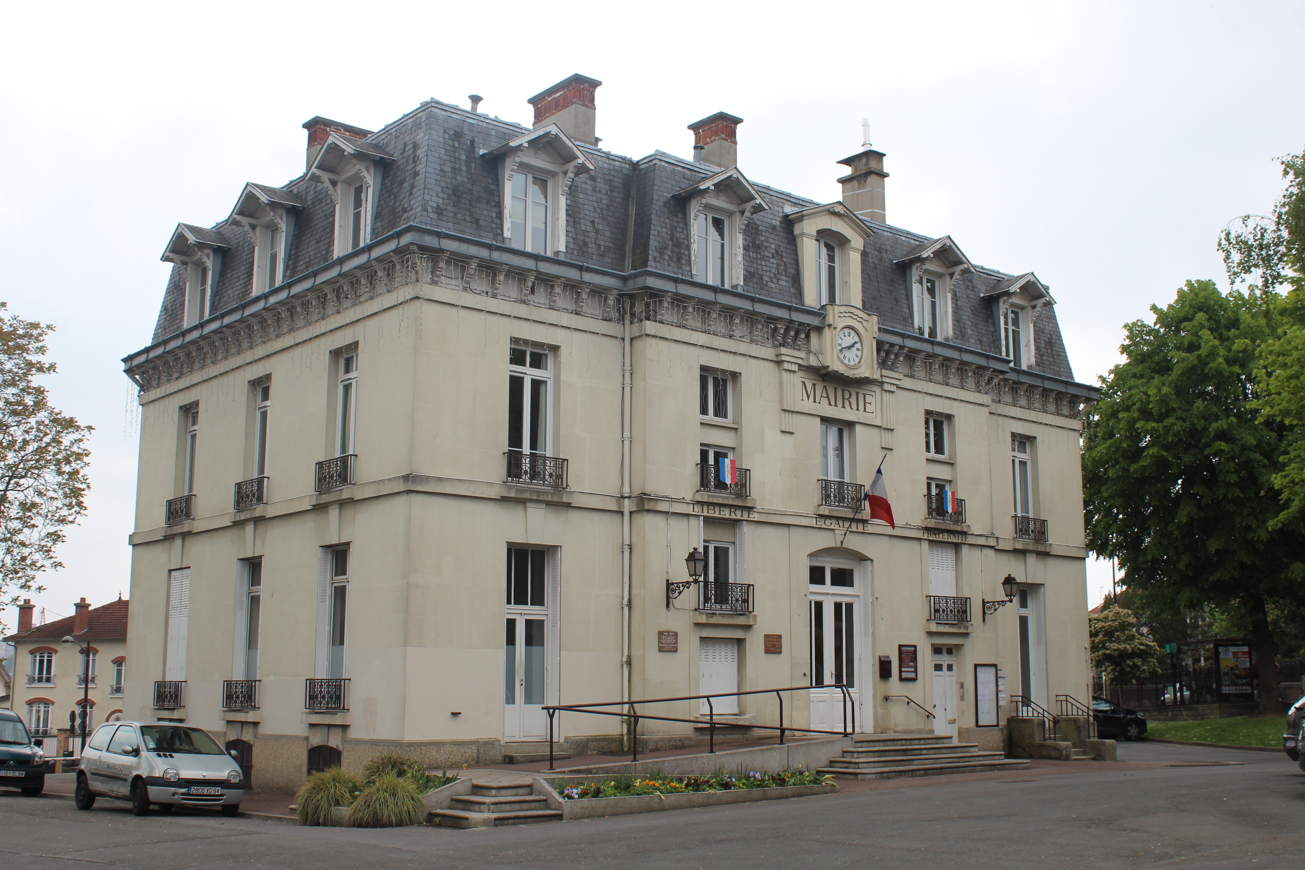 Mairie de Villiers-sur-Marne.